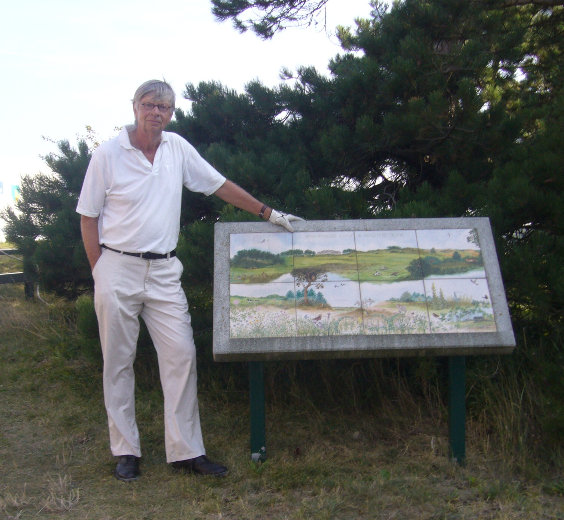 Gerard Jol, Nederlands golfbaanarchitect